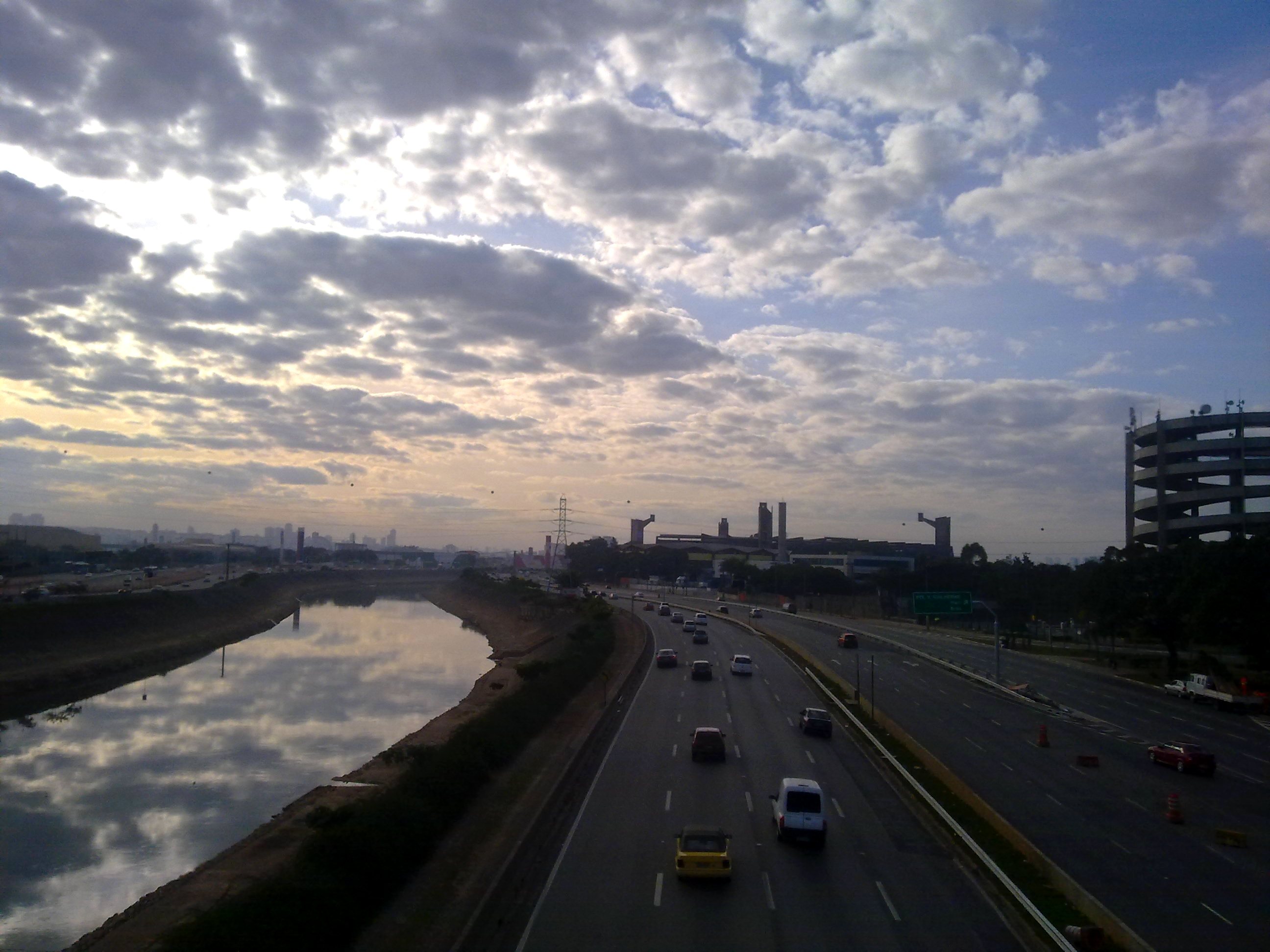 Foto de um trecho da Marginal do Rio Tietê nas proximidades do Pari, Santana e Vila Guilherme, zonas central, sudeste e norte da cidade de São Paulo, Brasil.